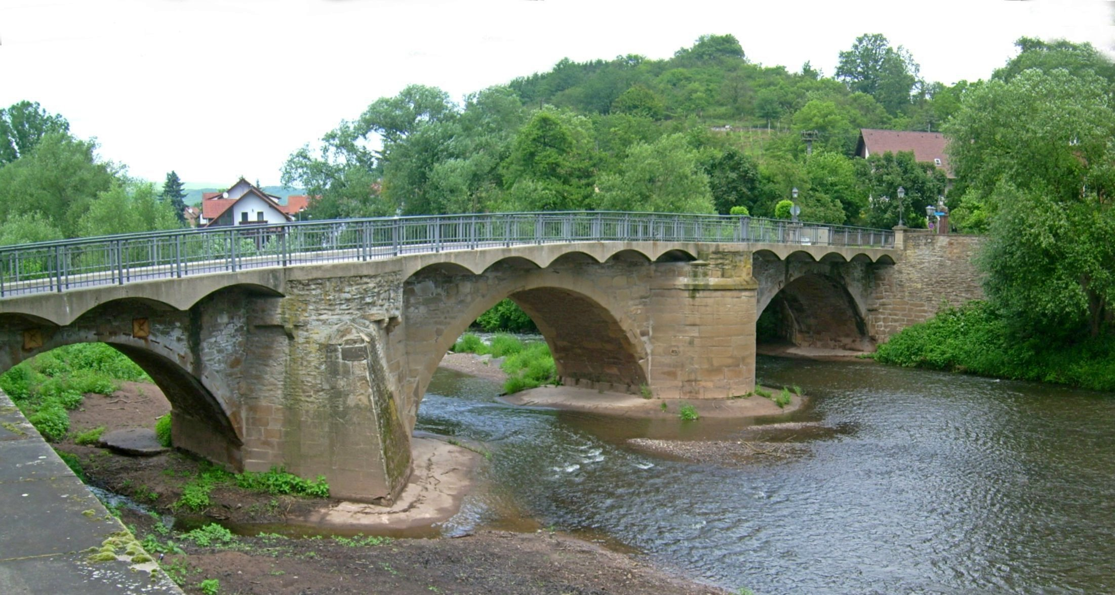 Brücke in Meisenheim